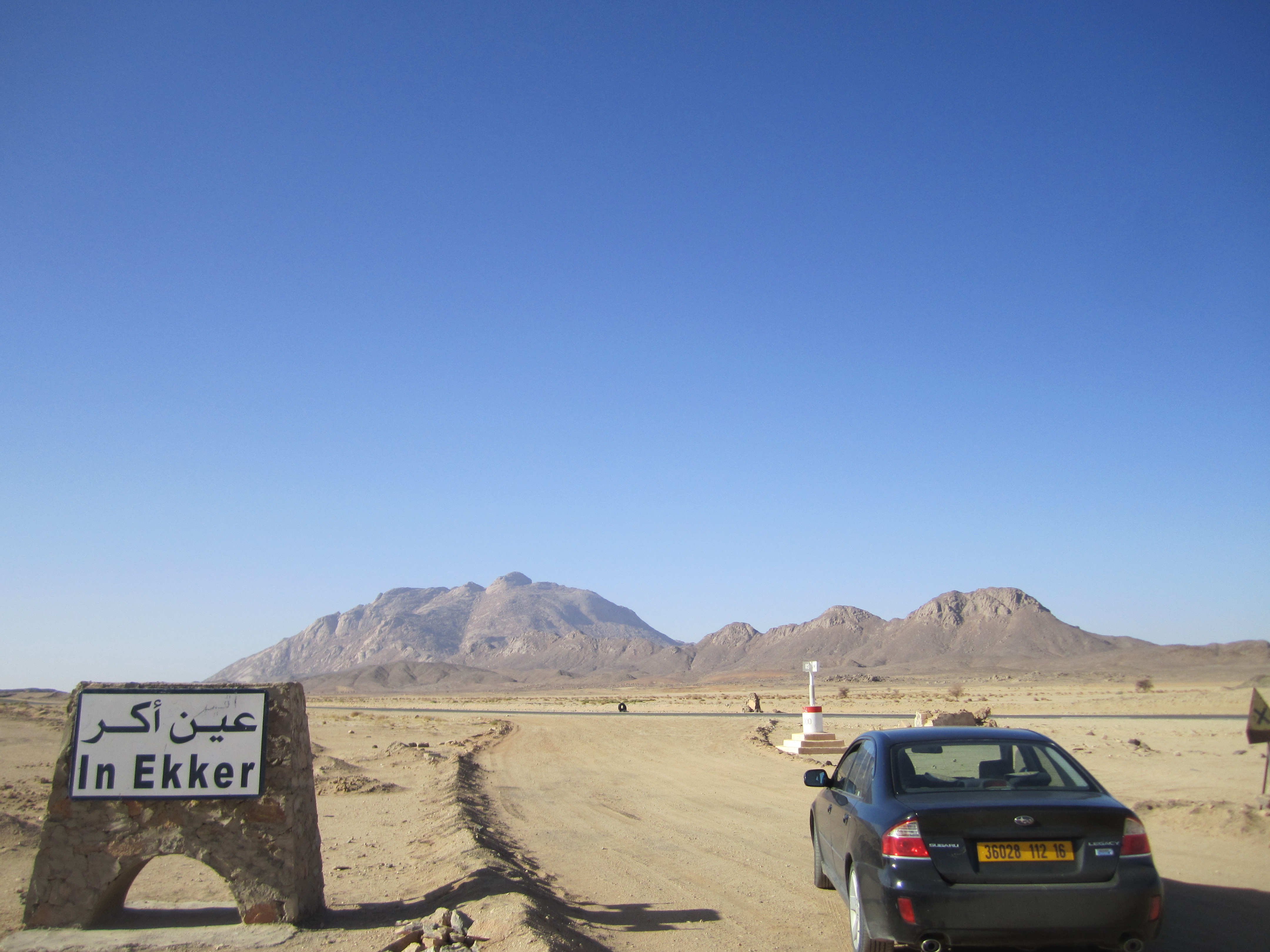 In Ekker - Taourirt Tan Afella